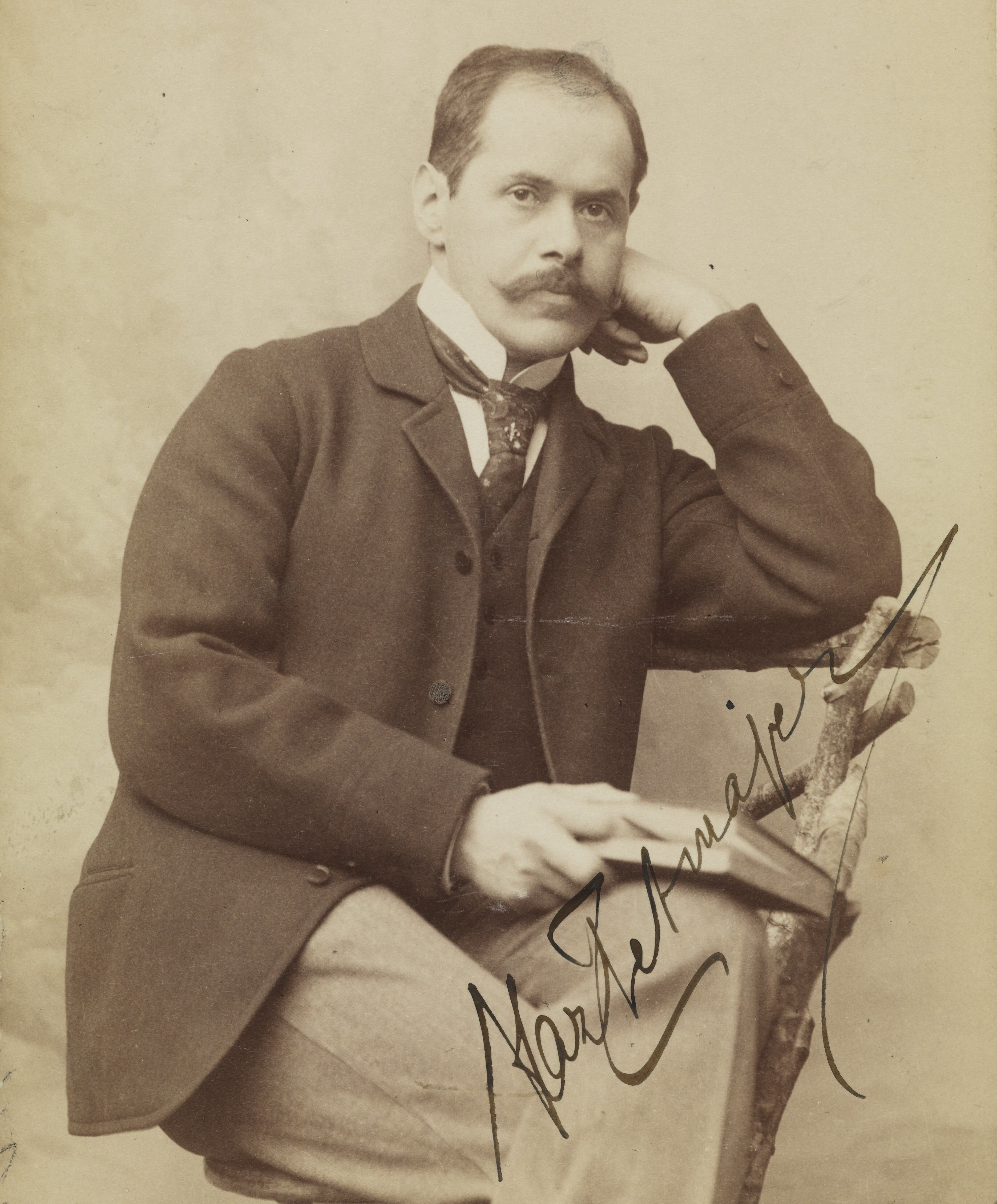 Kazimierz Przerwa Tetmajer, fot. przed 1901 r.